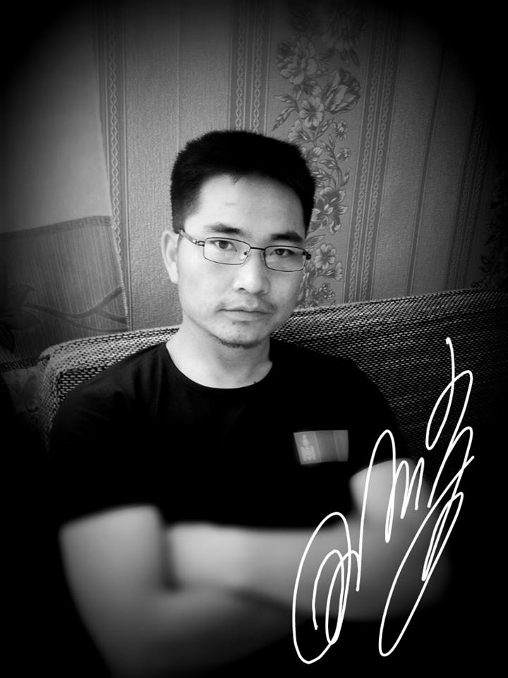 Монгол: Дундговь аймаг